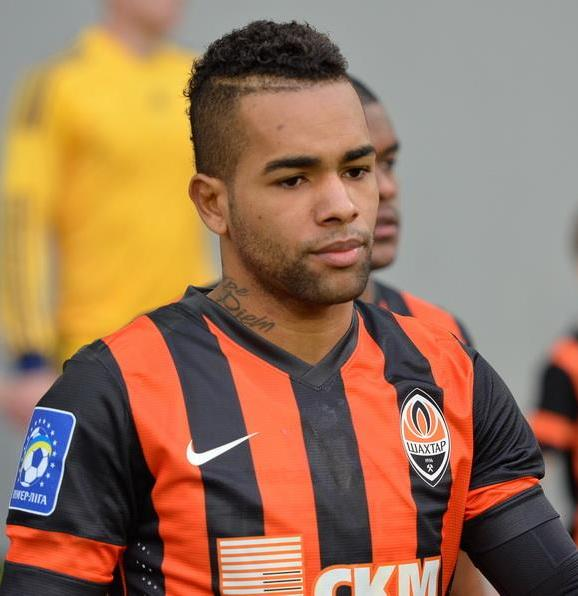 Алекс Тейшейра